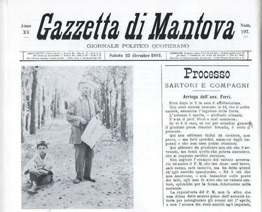 Gazzetta di Mantova del regno d' Italia